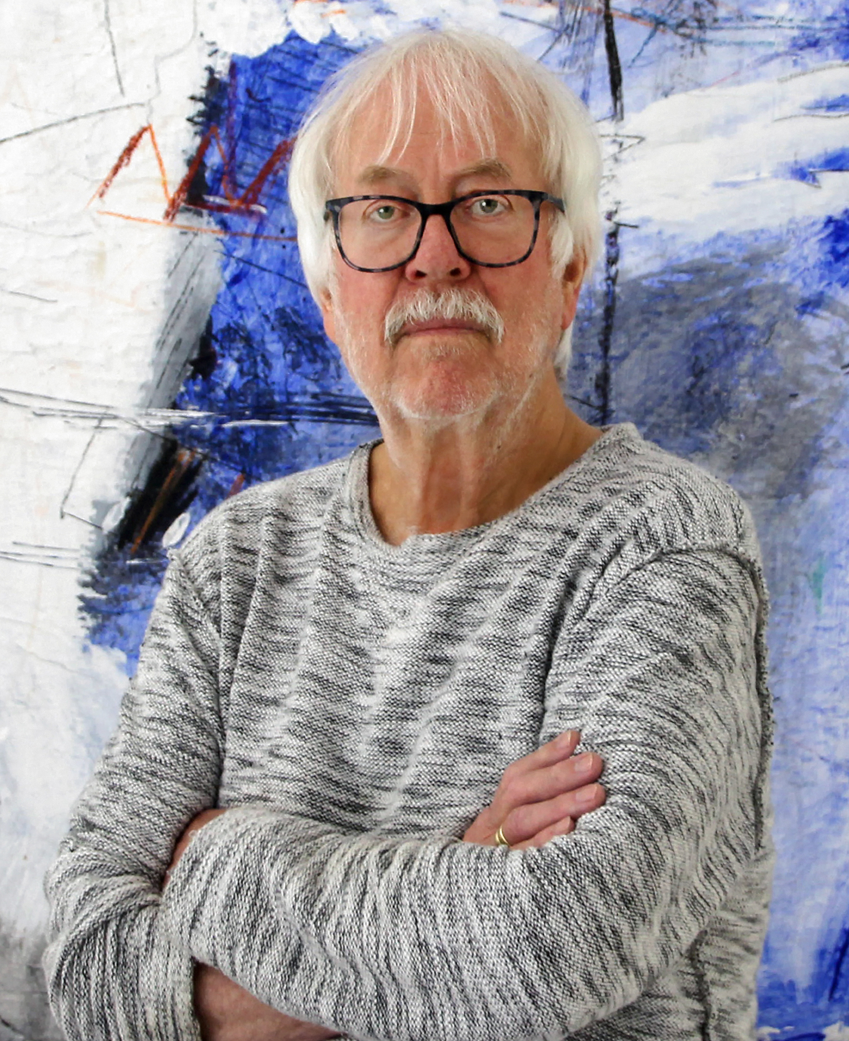 Gotthart A. Eichhorn vor einem Gemälde von Johanna K. Eichhorn auf einem Foto von Marion Stahl